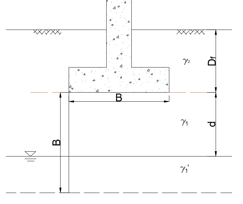 지하수위에 따른 얕은기초 극한지지력